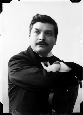 giornalista, scrittore e librettista italiano